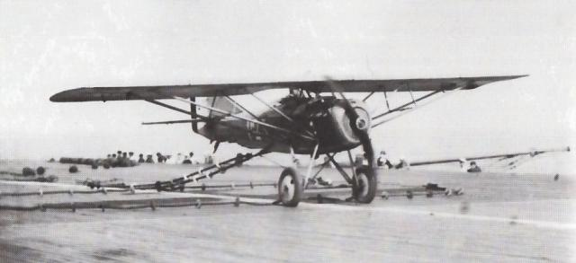 Gourdou-Leseurre GL.22 à l'appontage